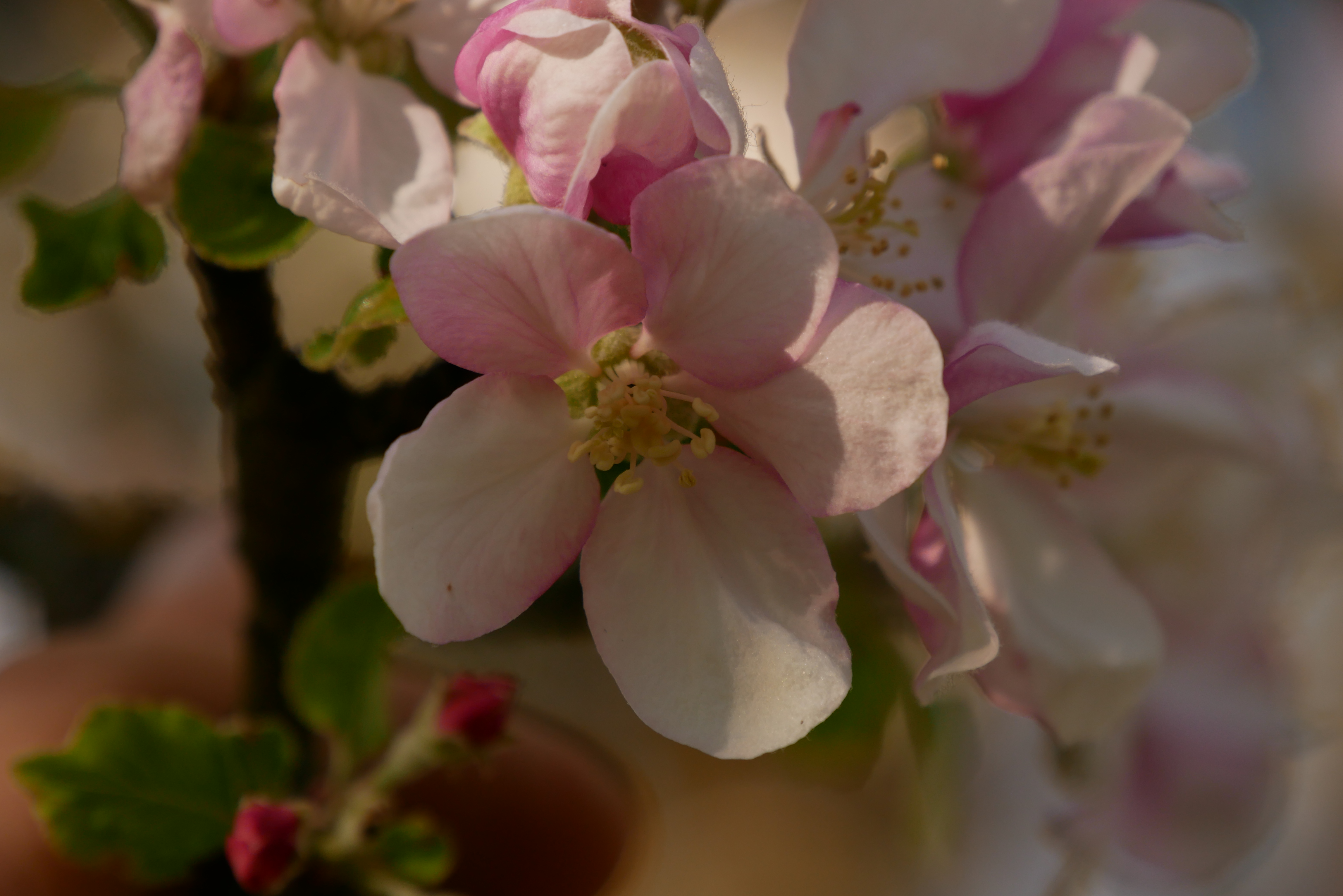 Deutlich zu erkennen ist die Rosafärbung der Blütenblätter.